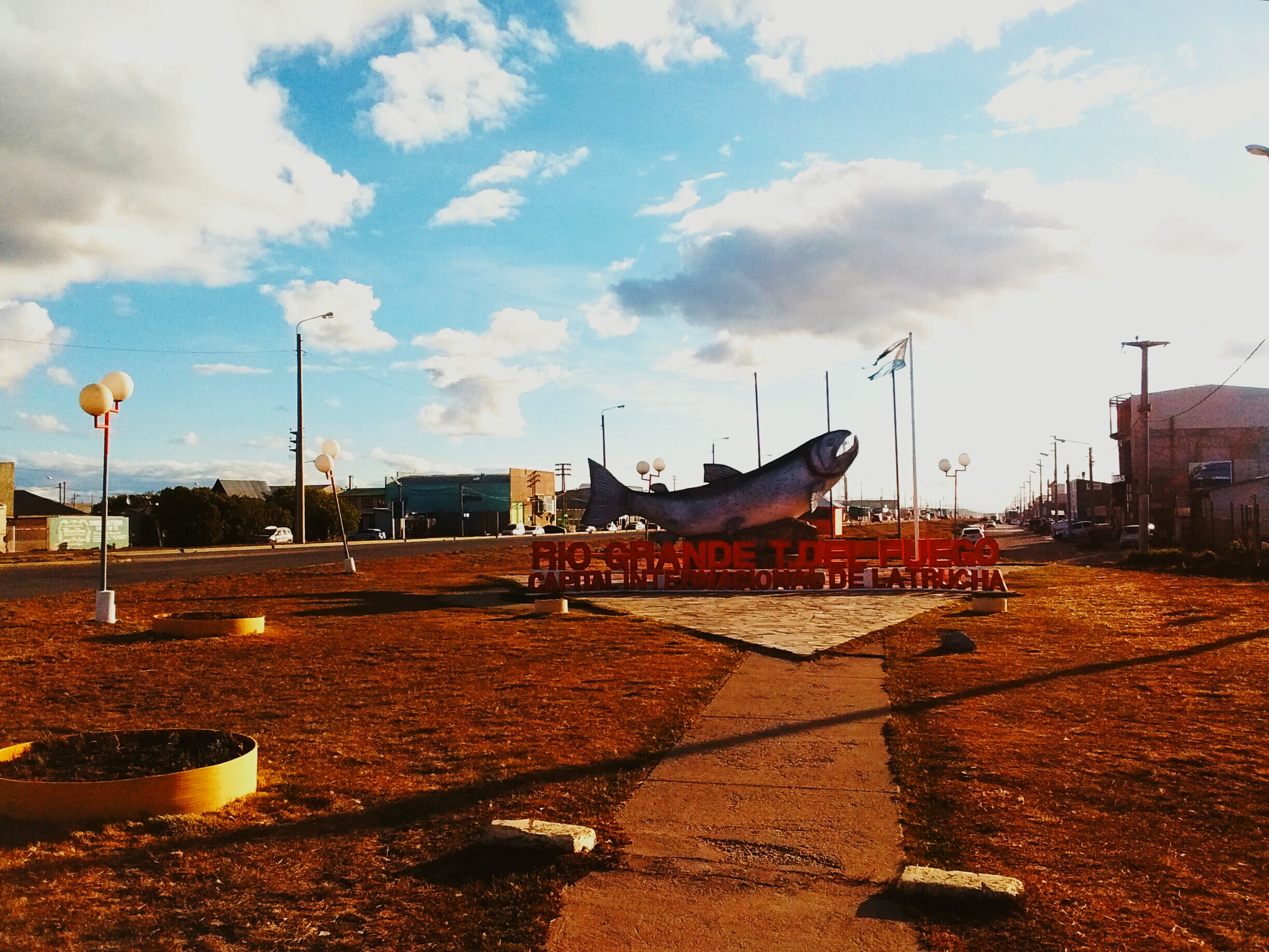 Monumento al Salmón en Río Grande